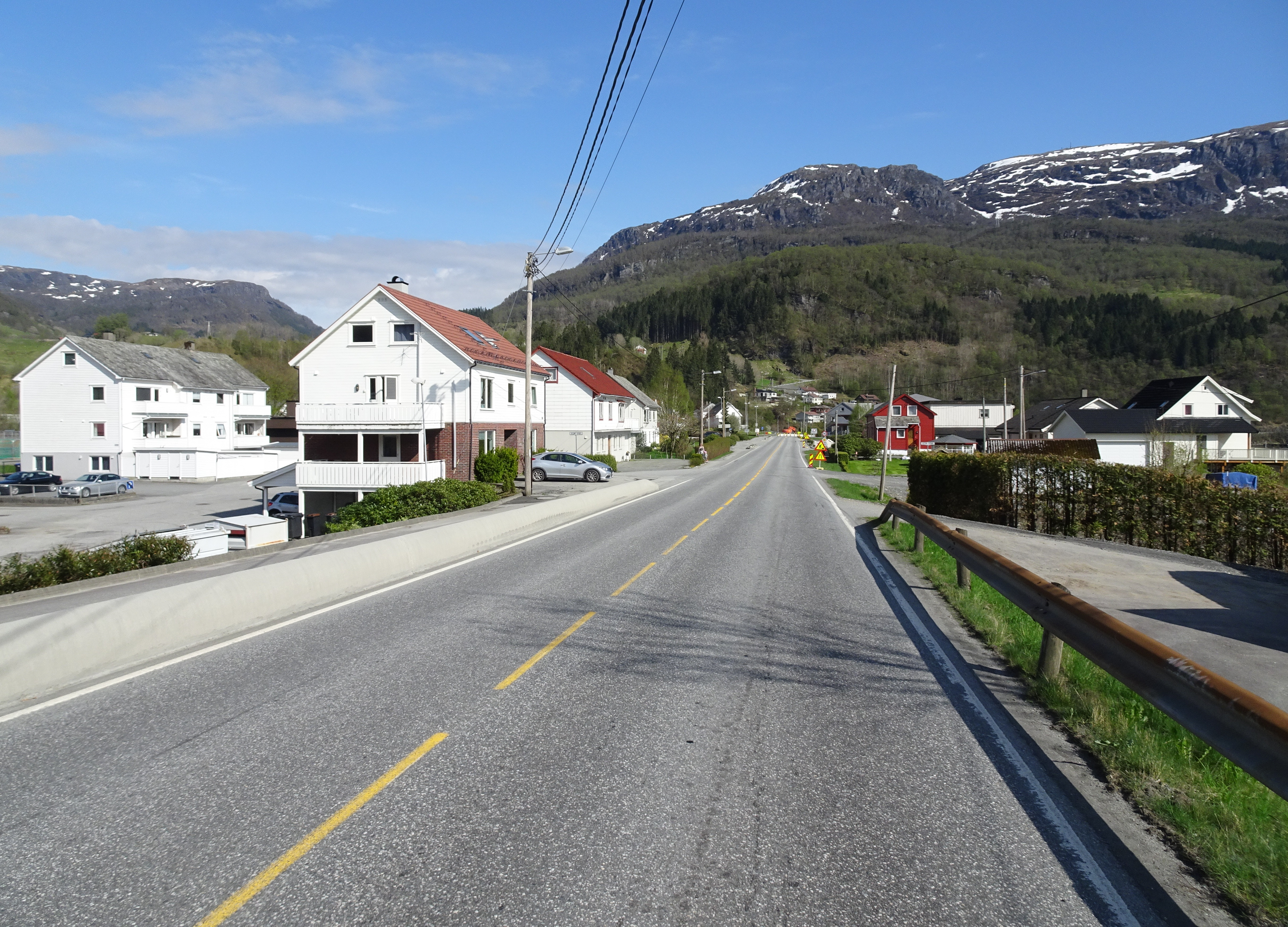 Saudavegen (primær fylkesvei 46) østover i Sandeid